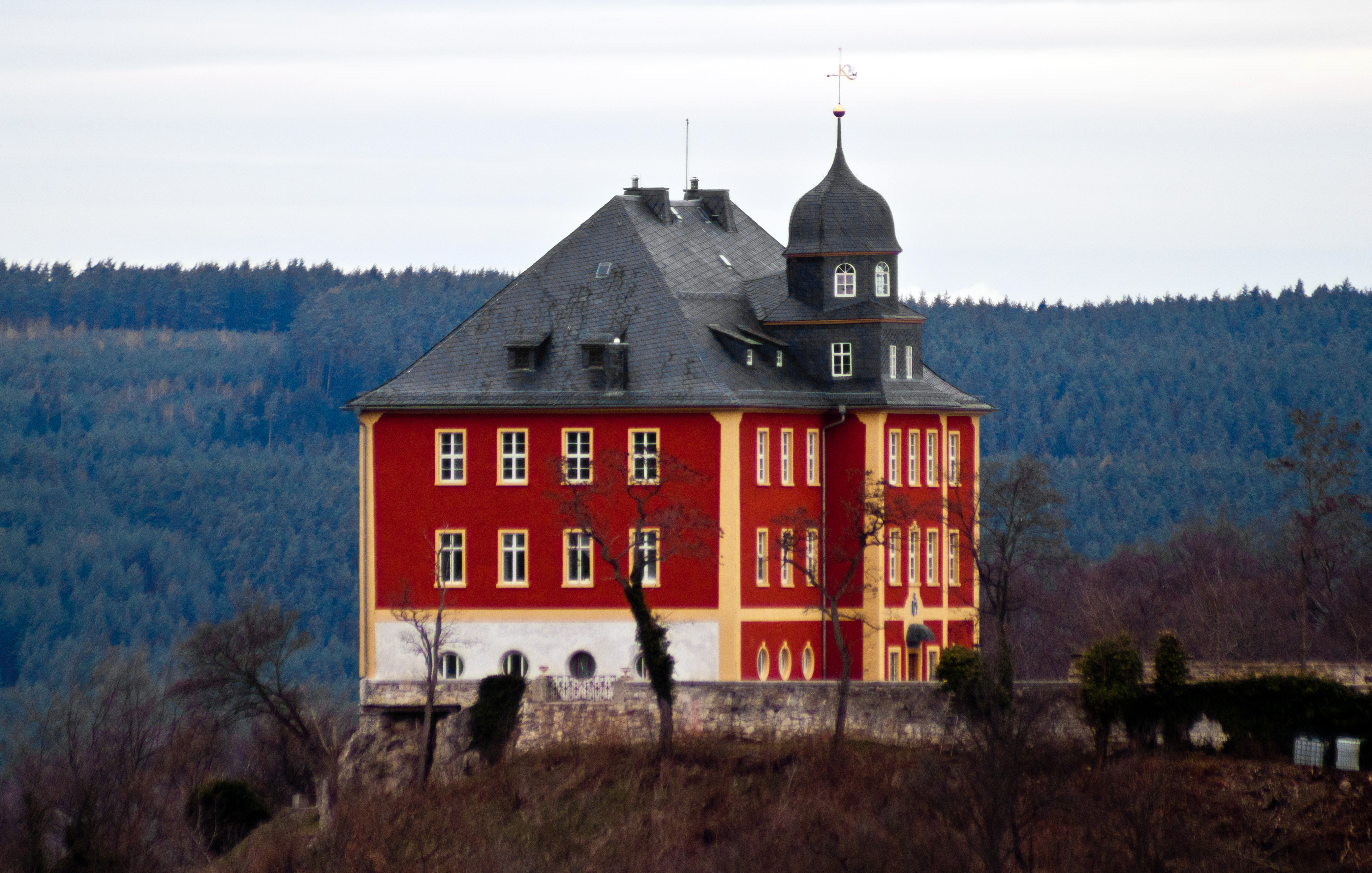 Das Schloss Brandenstein, von der Burg Ranis aus gesehen.